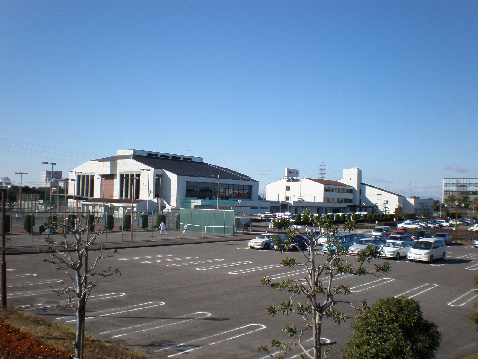 愛知県小牧市にある小牧勤労センター